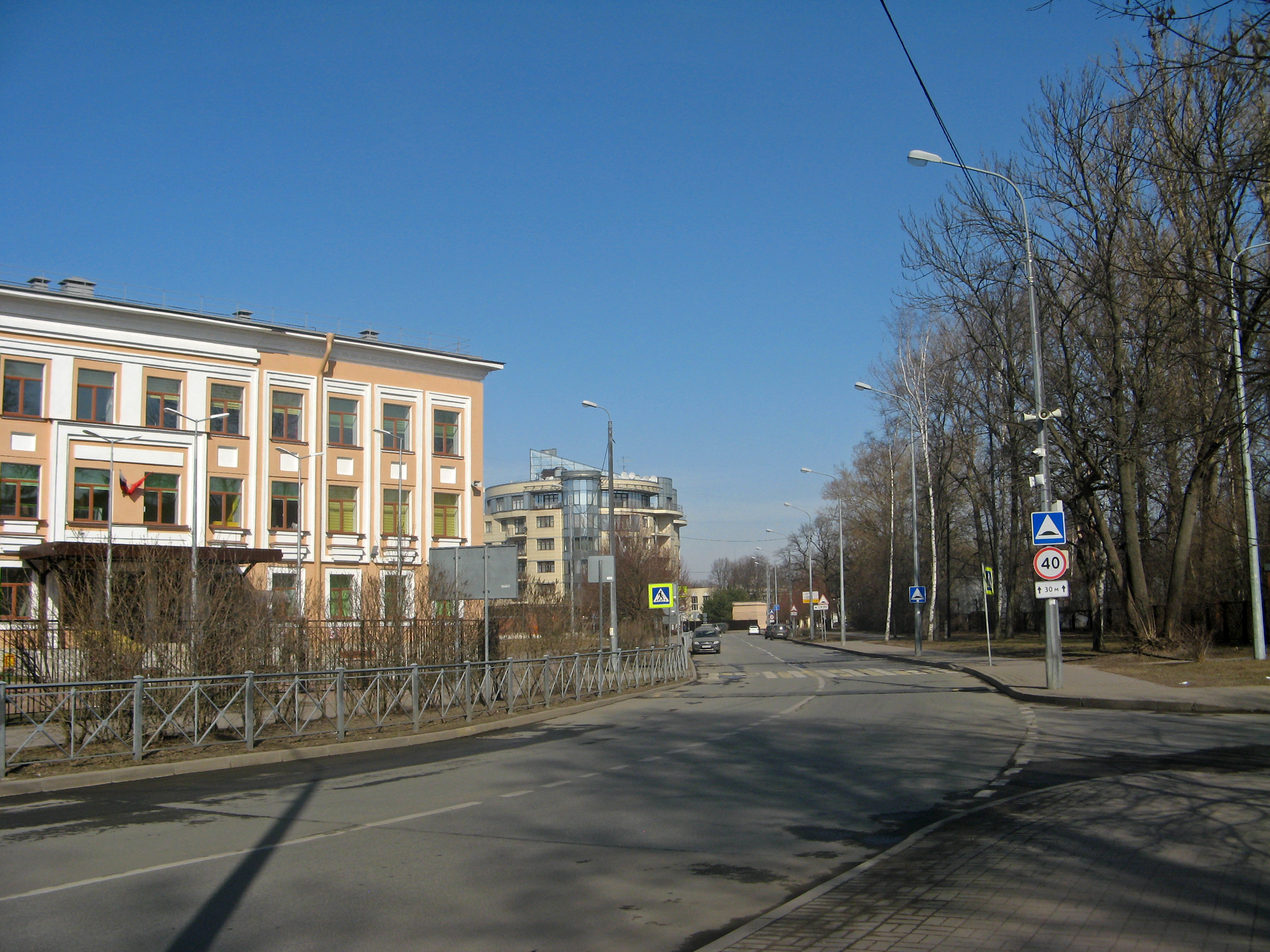 Депутатская улица (Санкт-Петербург), вид от дома №6